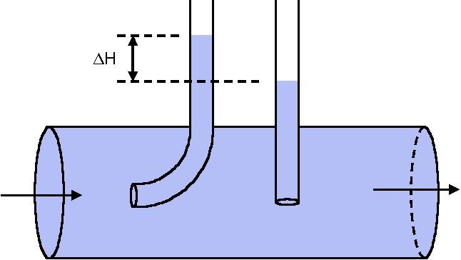 Pitotbuis - eigen werk - publiek domein